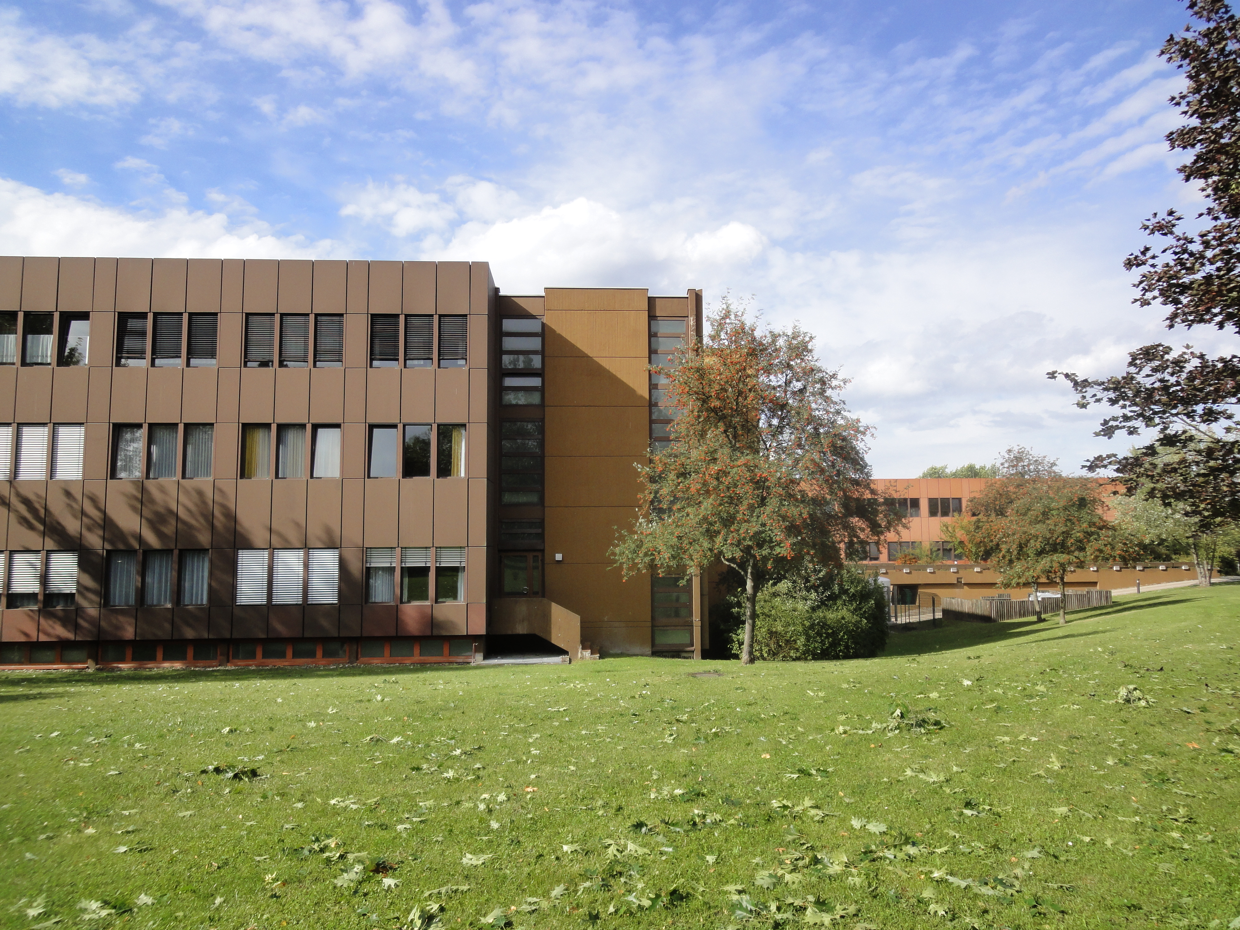 Das klinische Zentrum für Neurologie und Psychiatrie der Rhein-Mosel-Fachlink Andernach